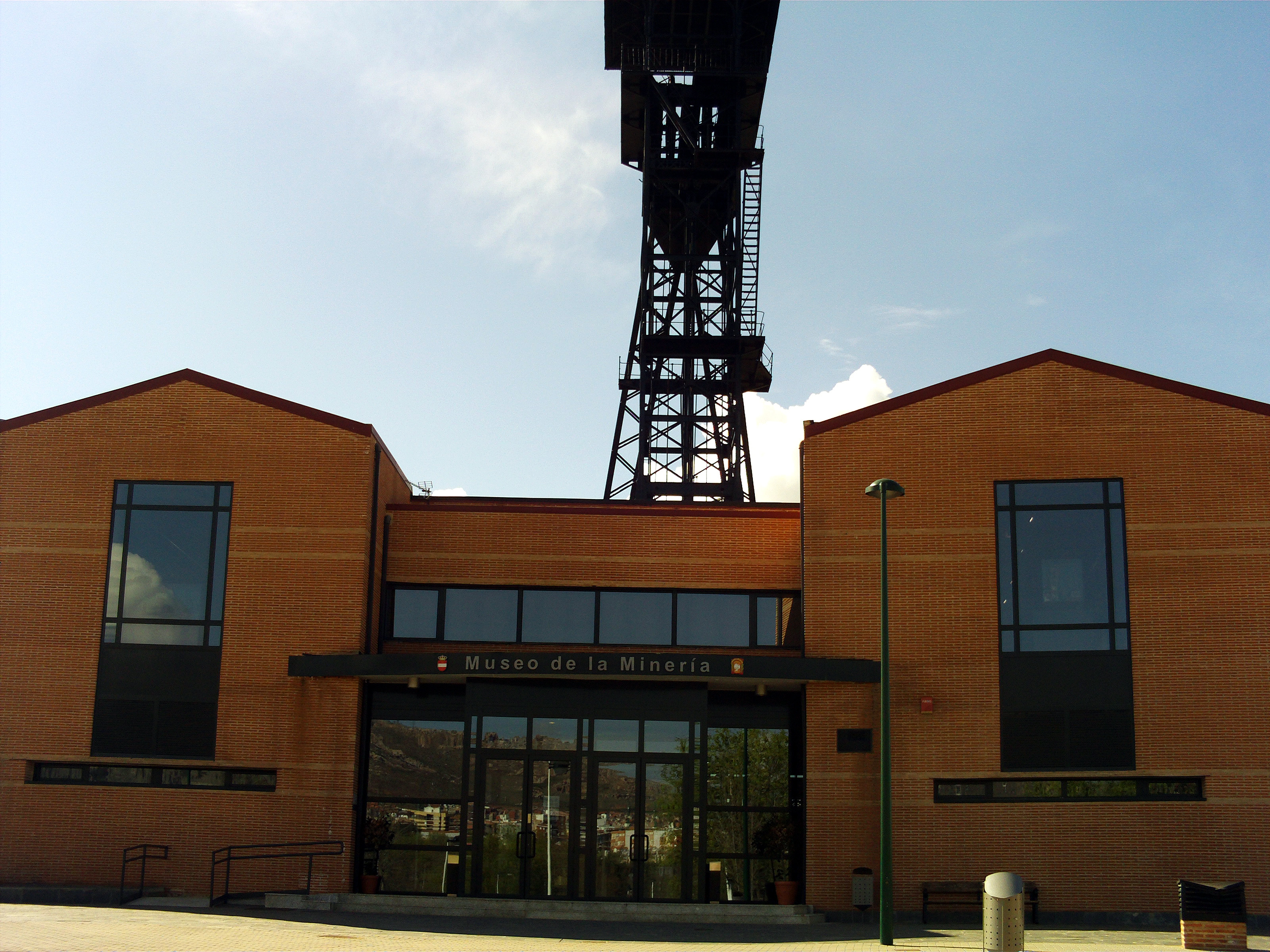 Museo de la Minería de Puertollano, Puertollano, Spain.